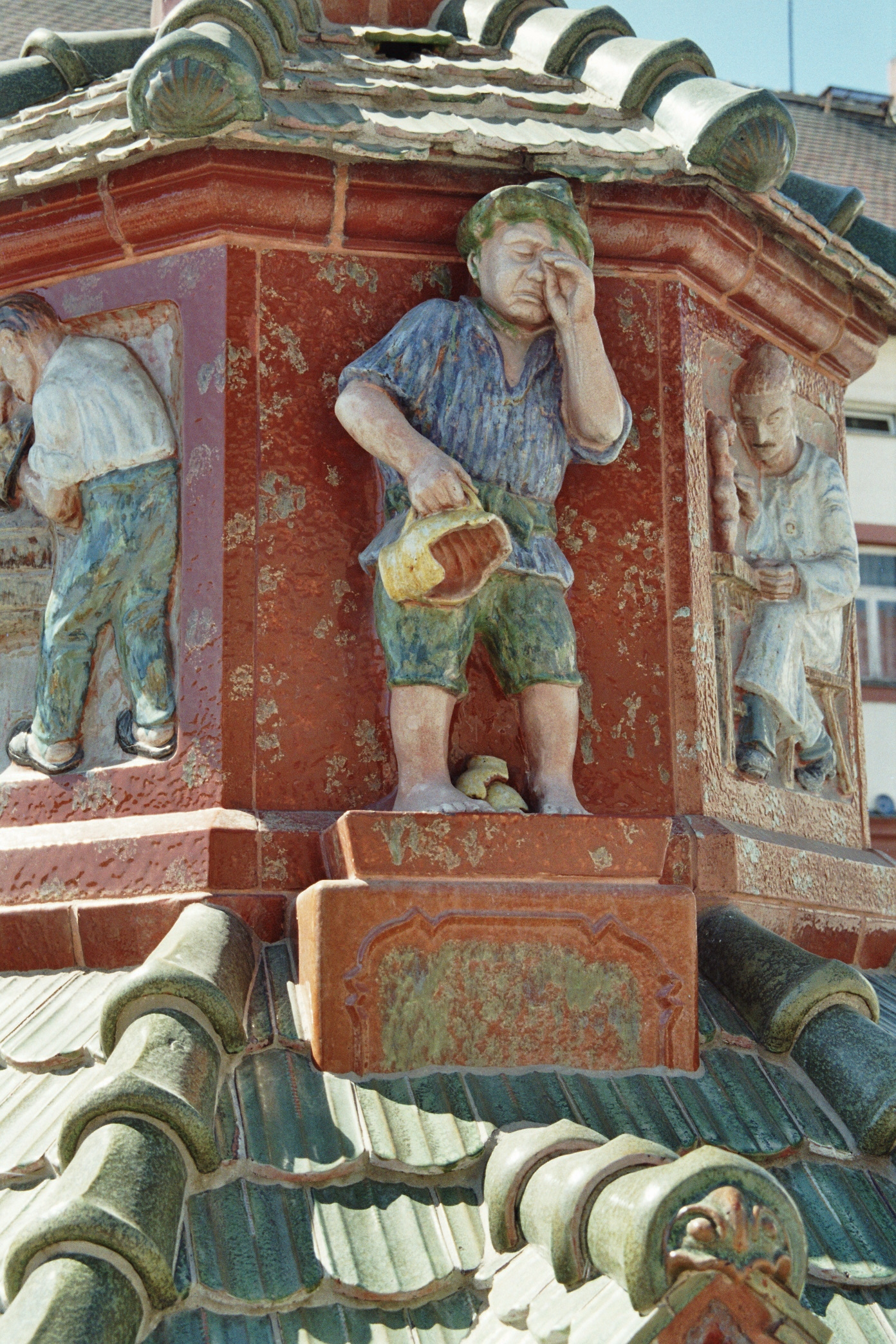 Detail am Töpferbrunnen in Kohren-Sahlis